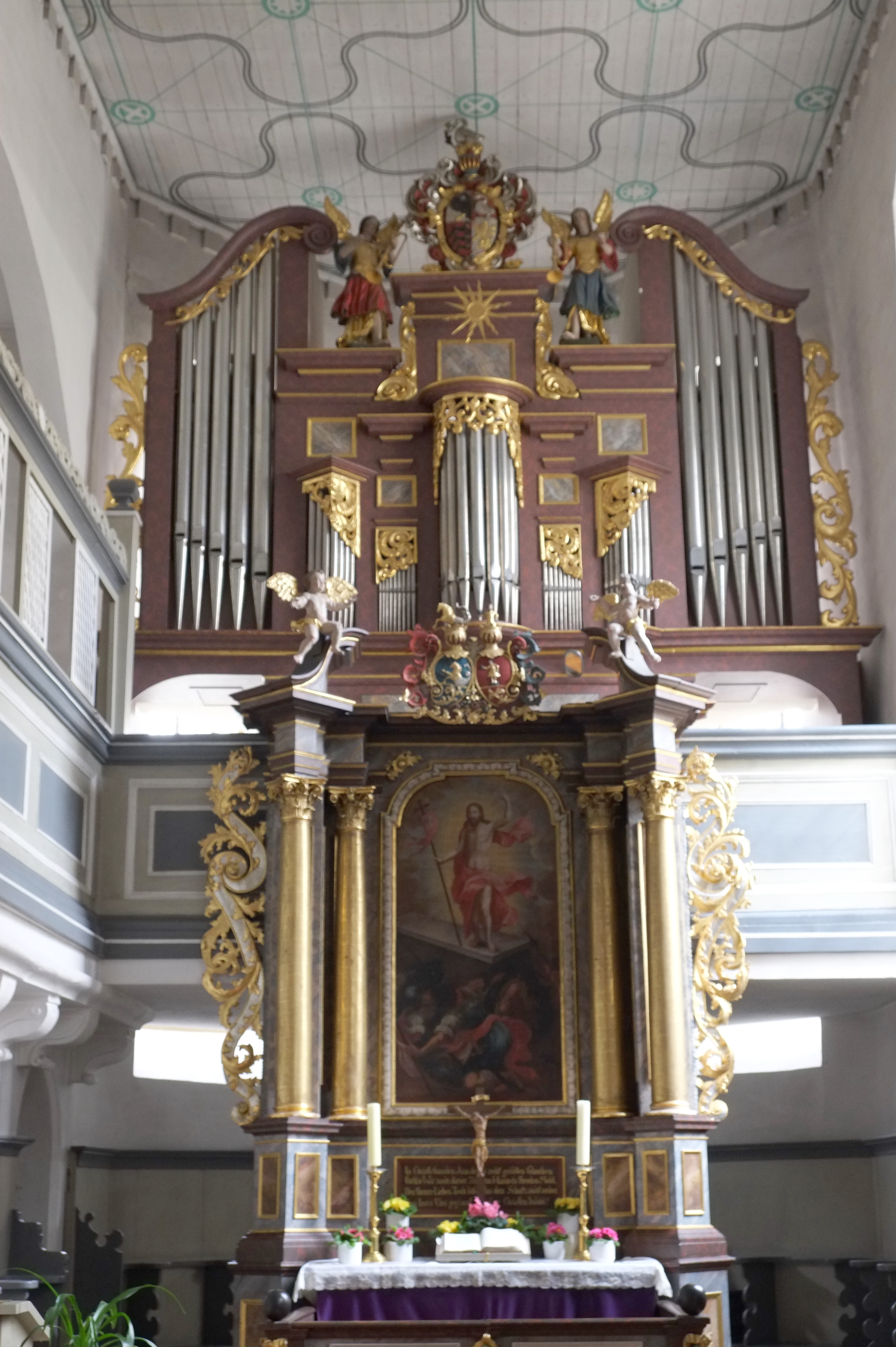 Evangelische Kirche in Prichsenstadt im Landkreis Kitzingen (Bayern, Deutschland)